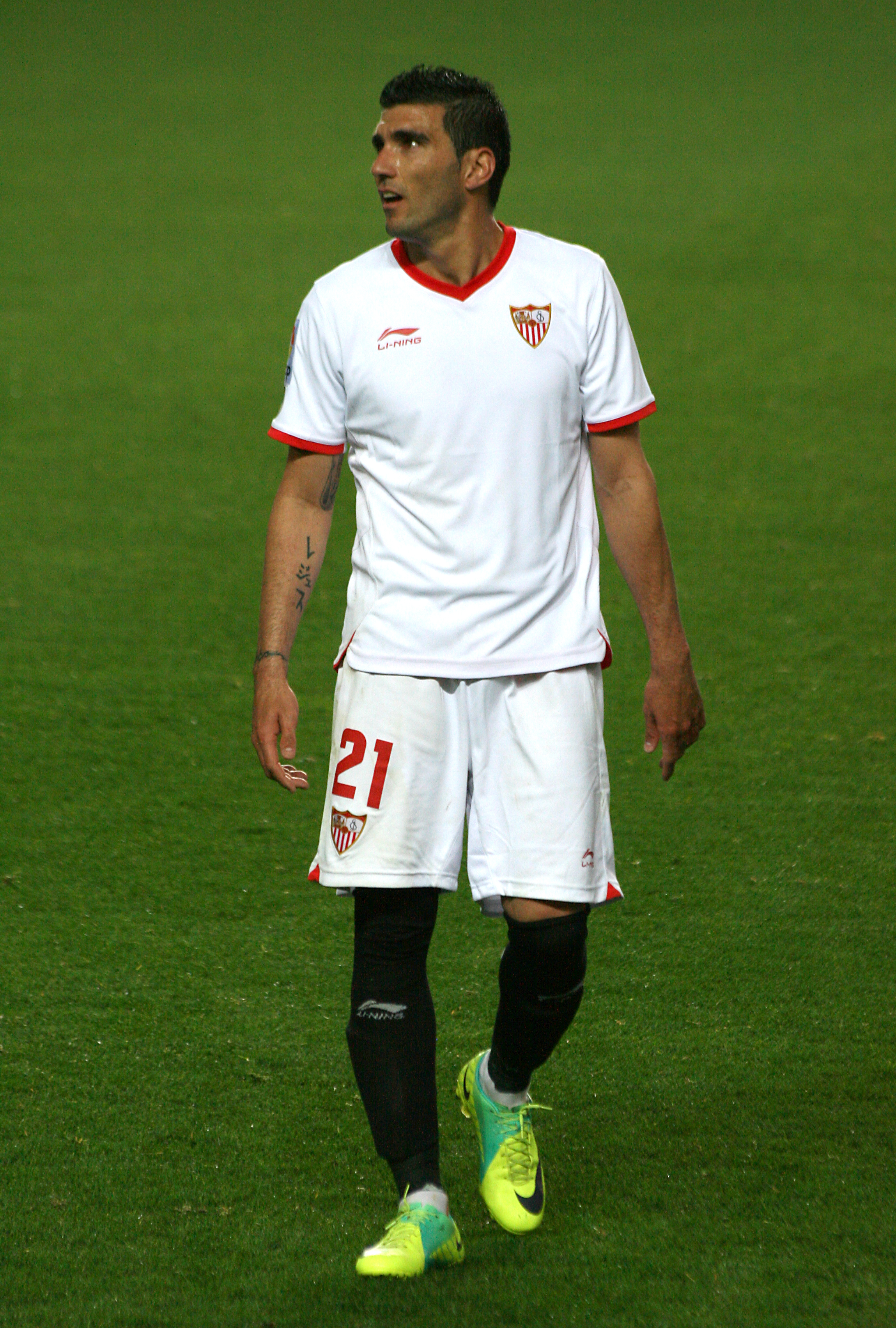 Jugador del Sevilla Fútbol Club, equipo de La Liga BBVA.